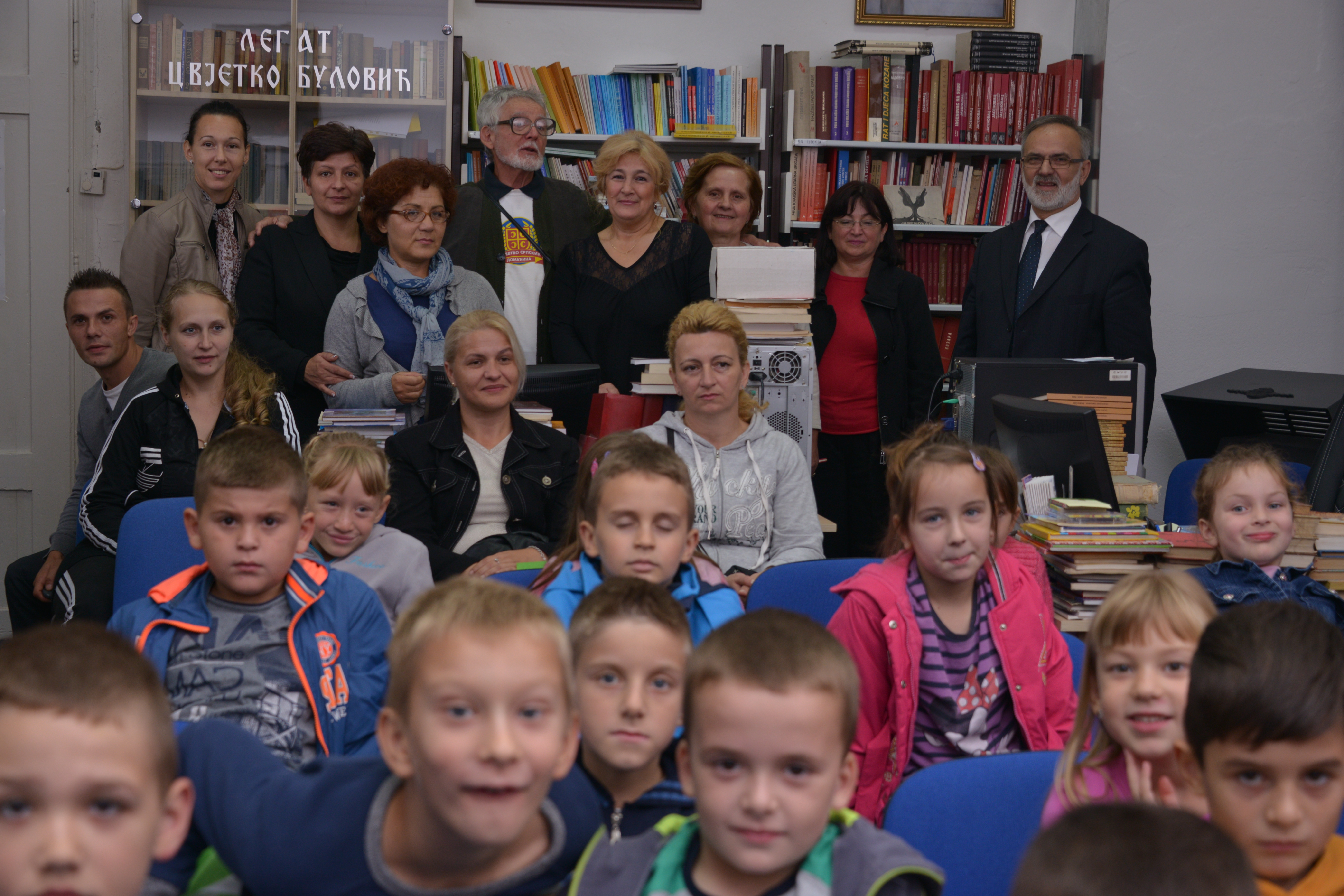 Велики и учени писац Добрица Ерић у посјети нашој Библиотеци